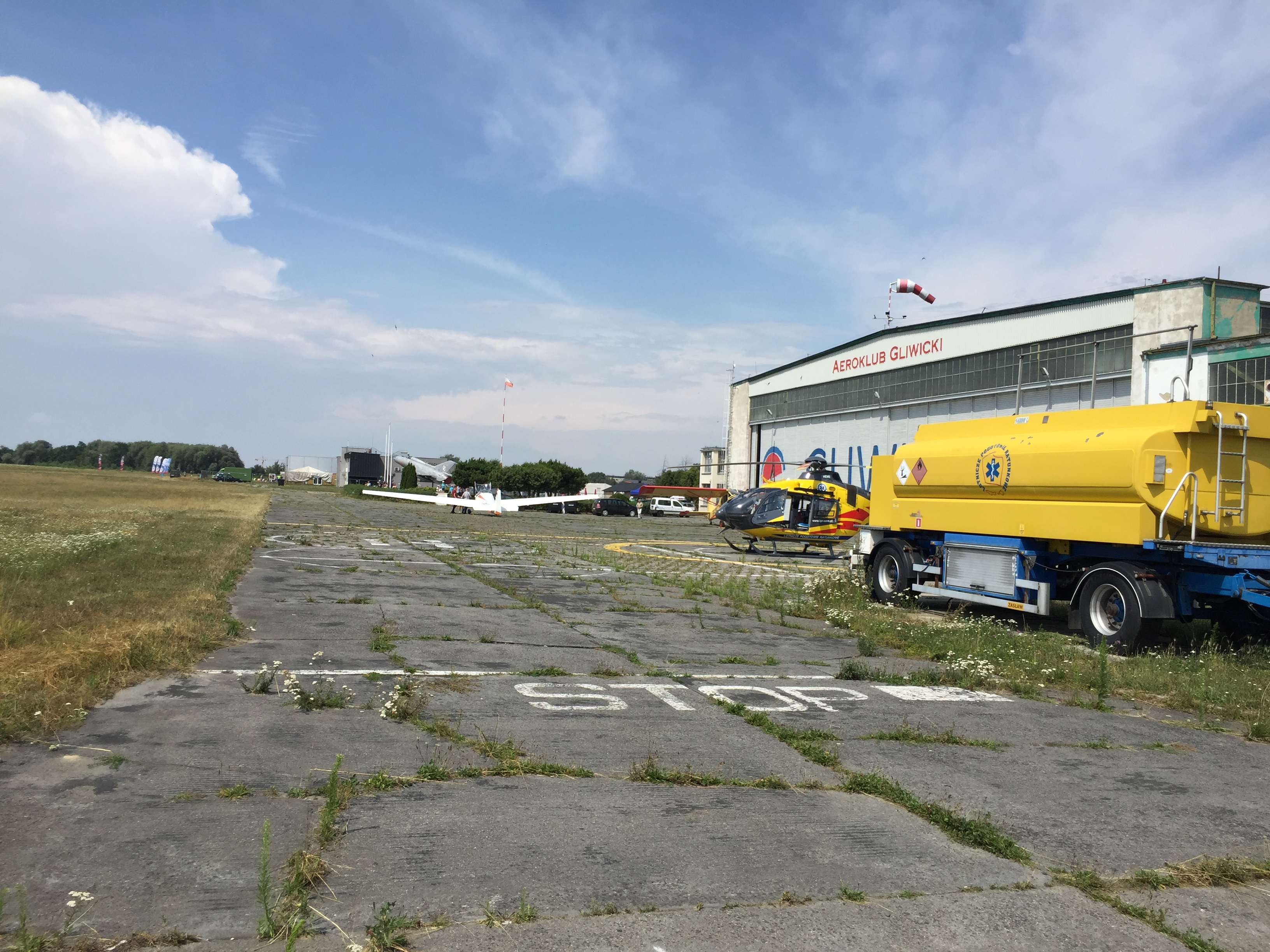 Hangar aeroklubu gliwickiego (Sierpień 2019)